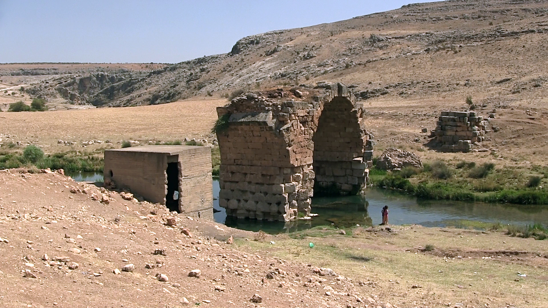 Römische Brücke über den Karasu, einen Nebenfluss des Euphrat, in der türkischen Provinz Gaziantep